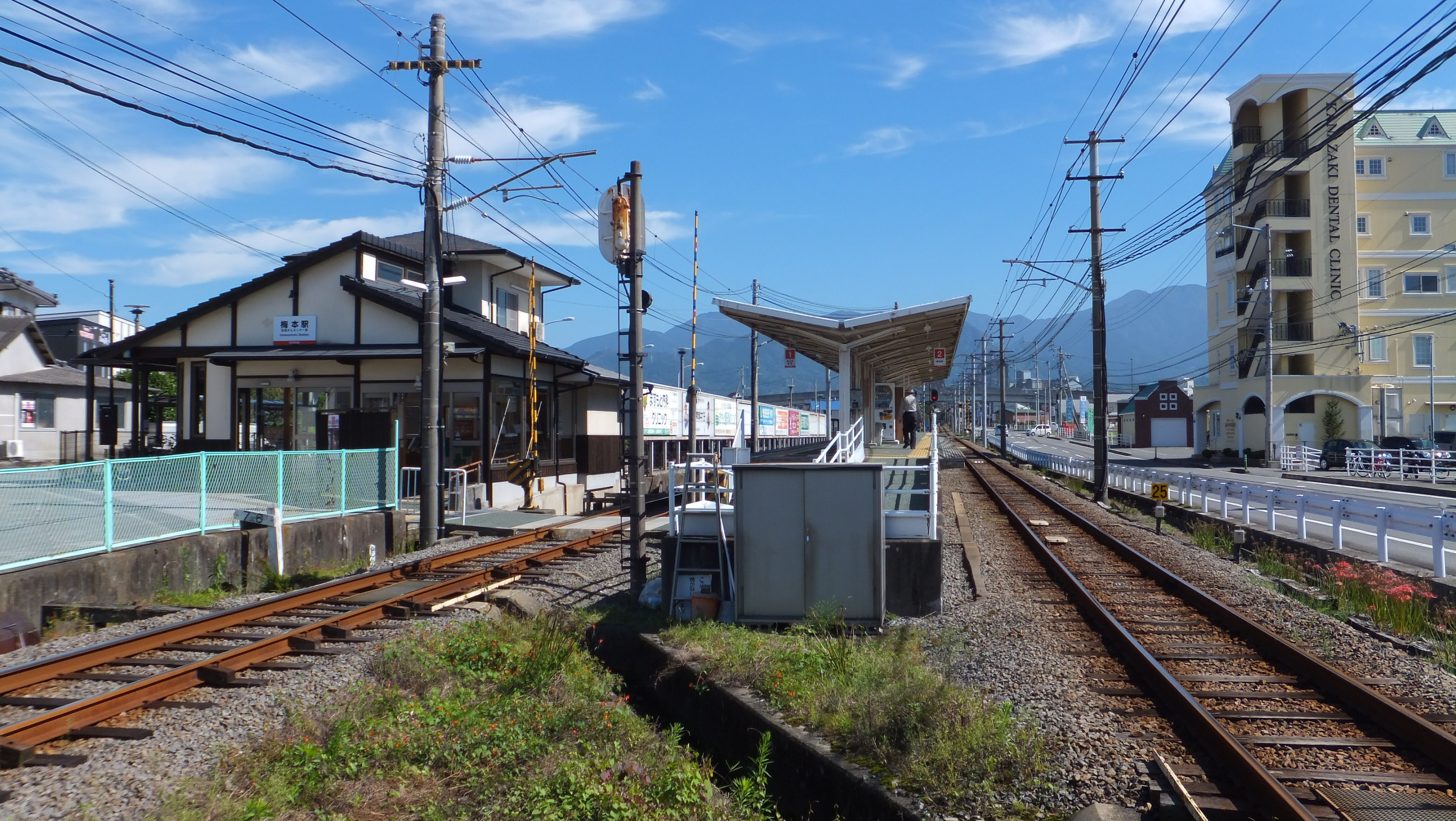 伊予鉄道 横河原線 梅本駅 平井方より（愛媛県松山市）2015年10月